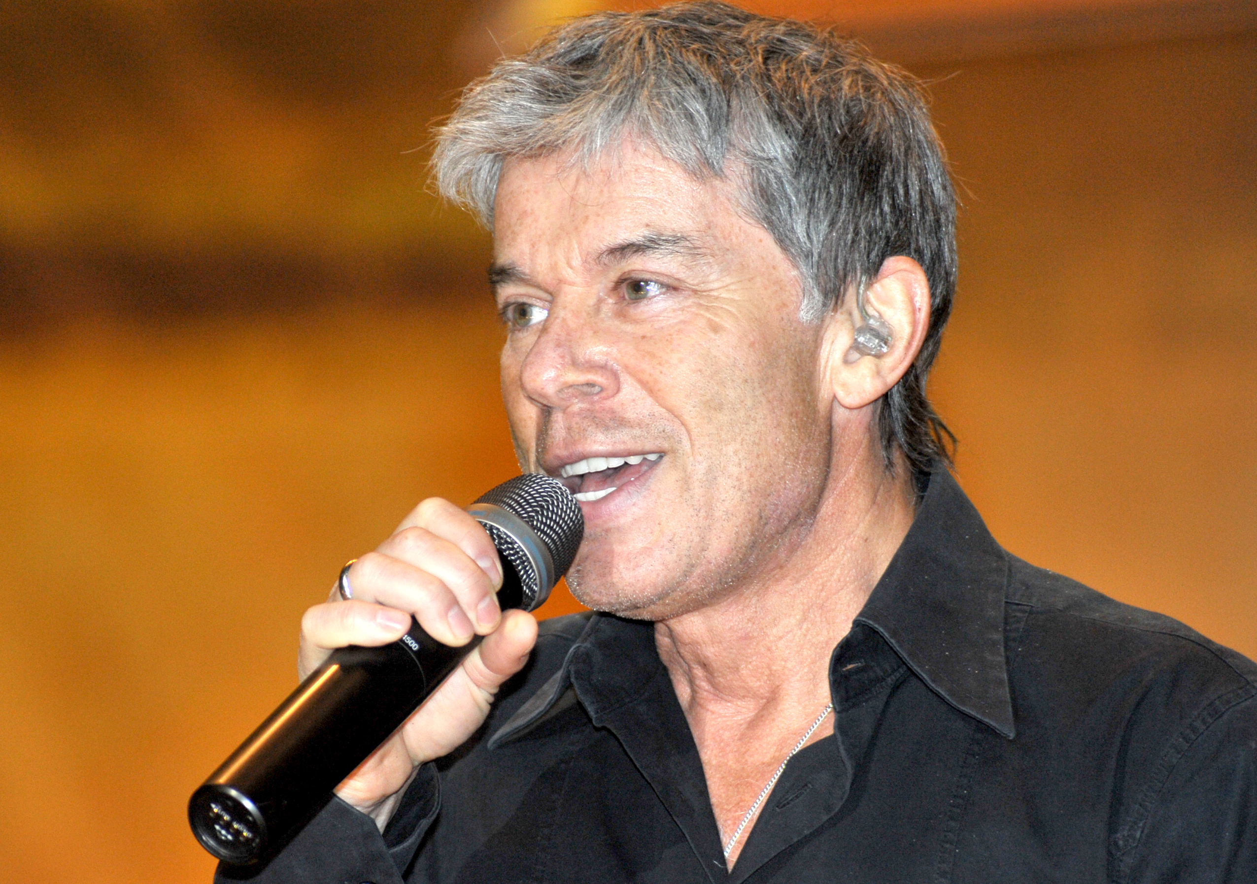 Газманов, Олег Михайлович . фото Чуприна Вадим